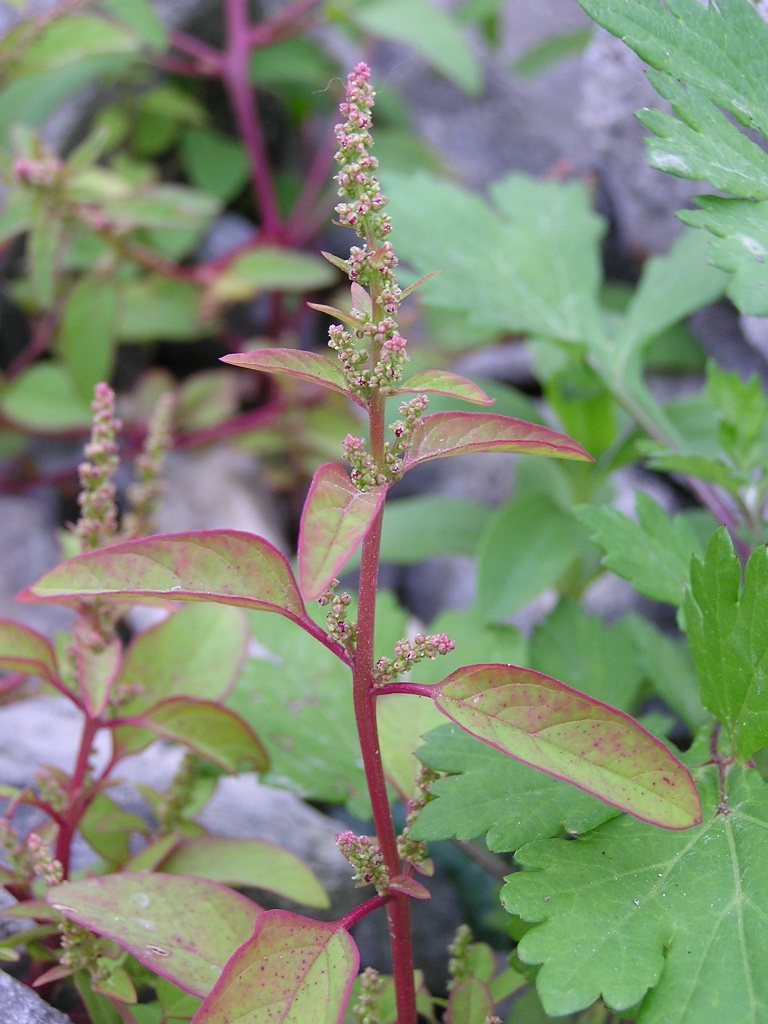 Chenopodium polyspermum am Bonner Rheinufer.